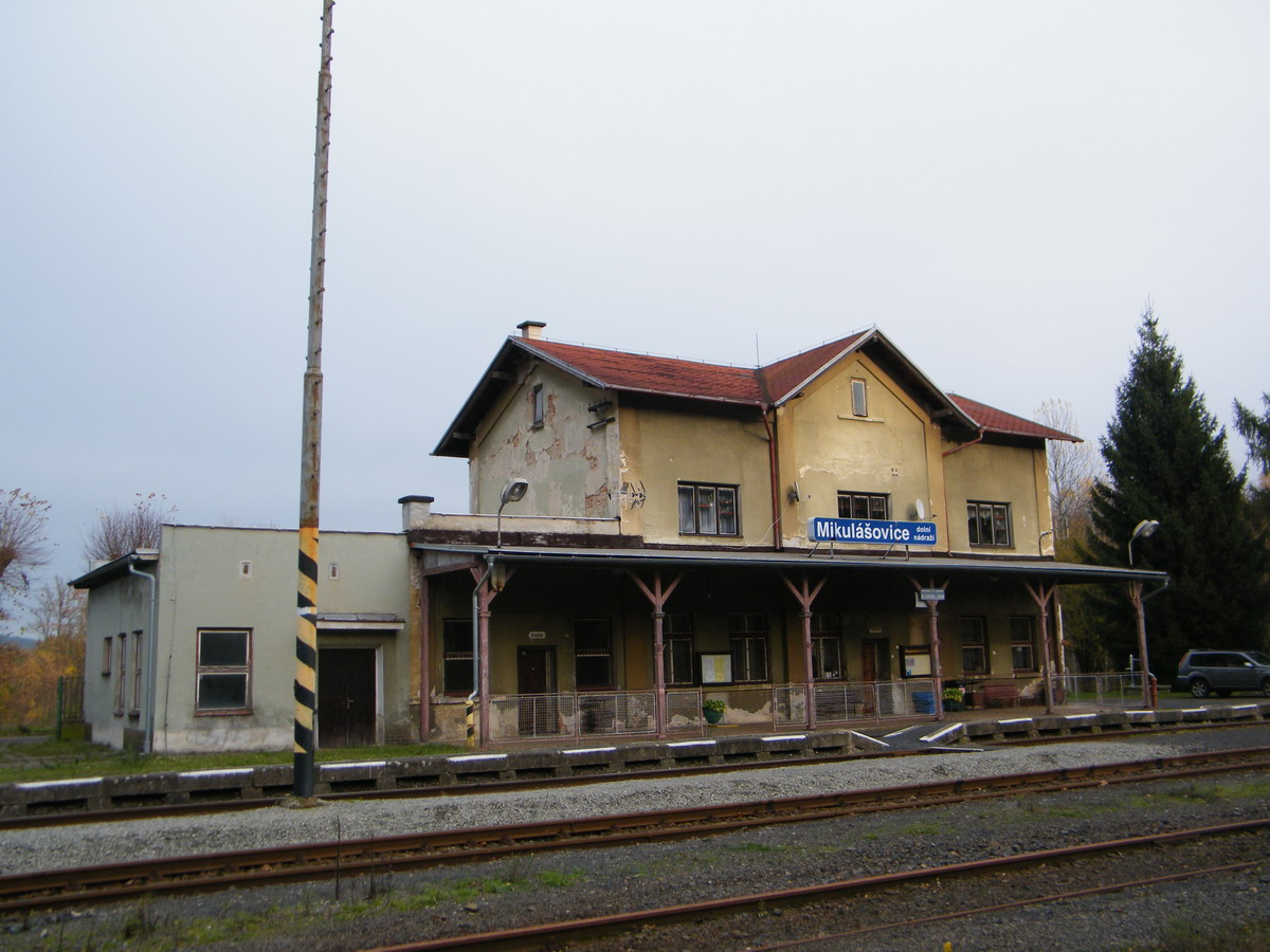 Mikulášovice dolní nádraží